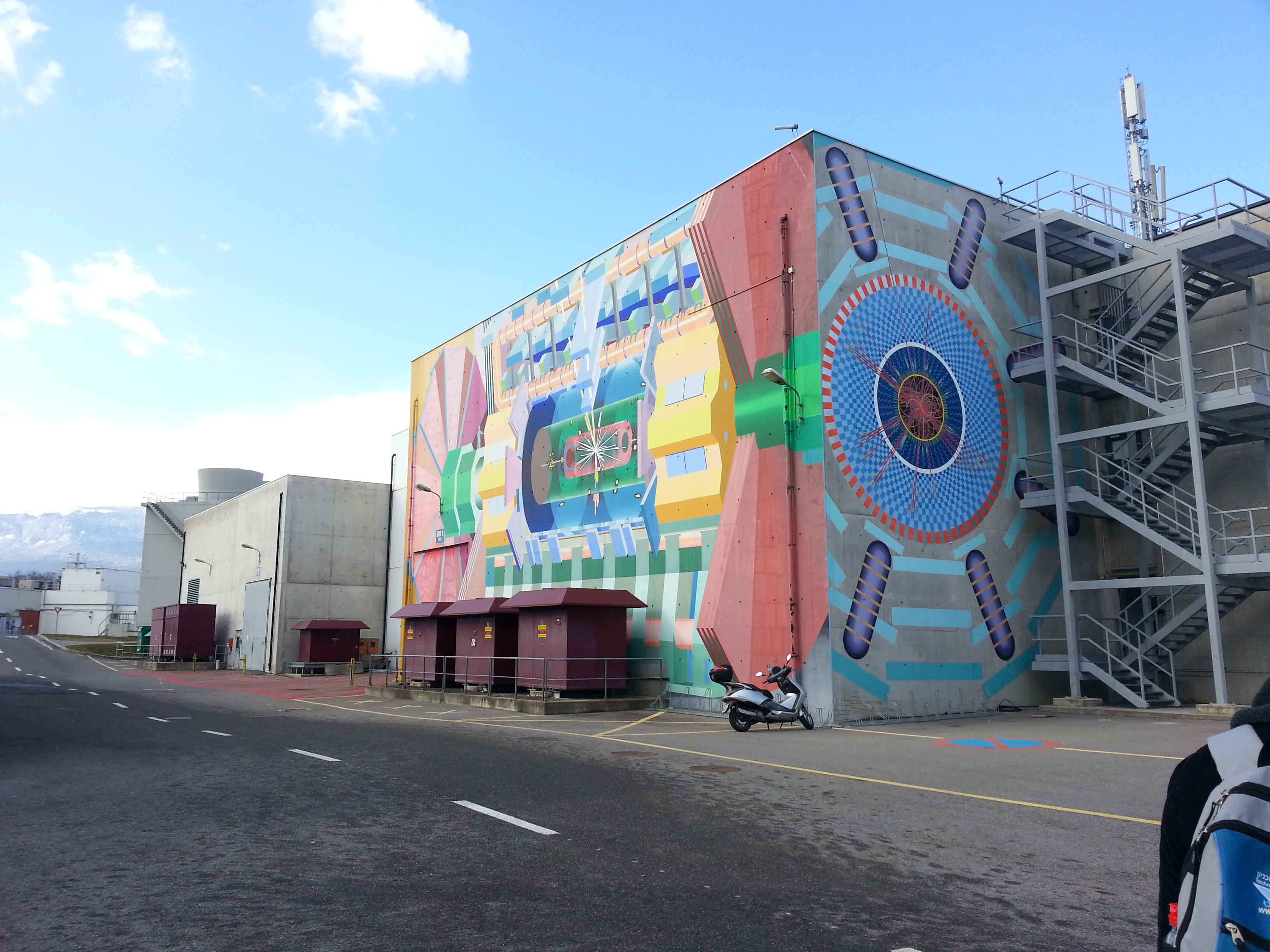 המבנה ממנו יורדים לגלאי האטלס עליו מצויר הגלאי בקנה מידה של 1:4( גודלו של הציור הנו רבע מגודלו של הגלאי האמיתי).